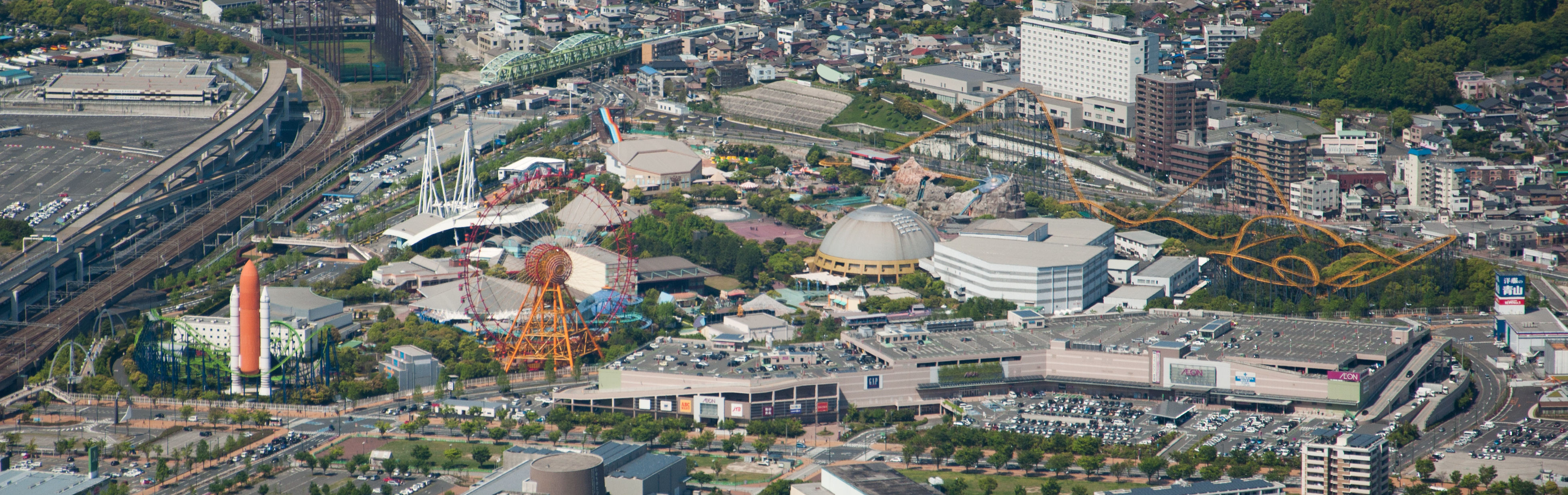 スペースワールドの全景